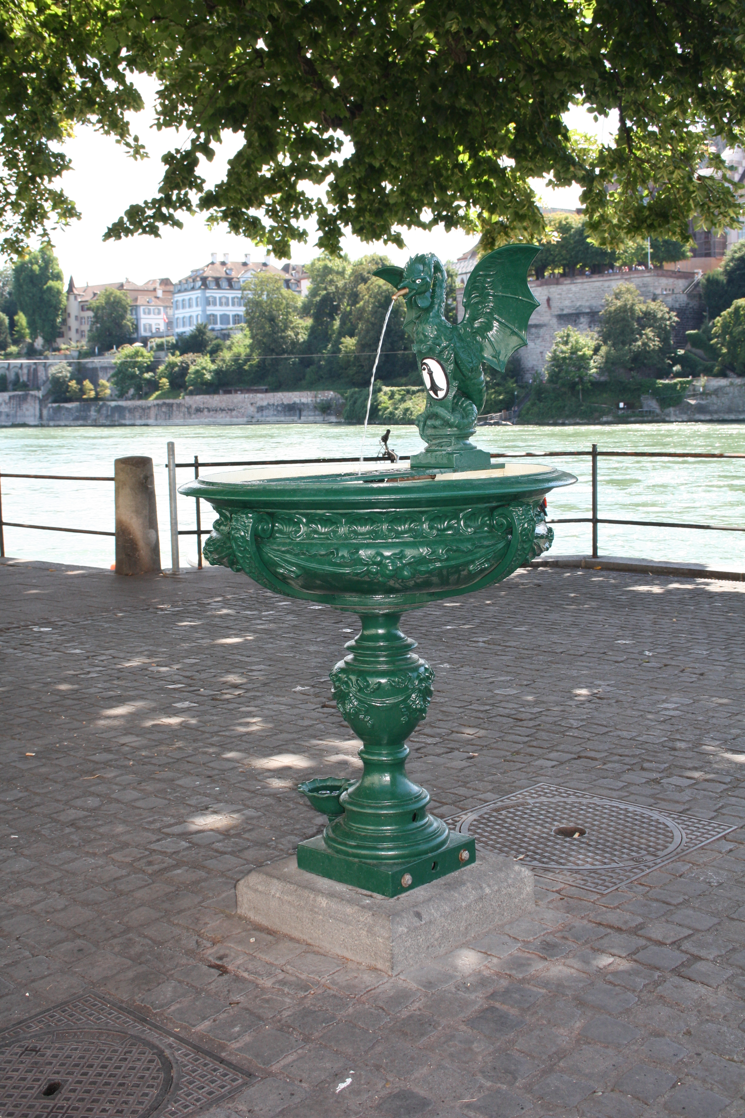 Basilisken Brunnen am Oberen Rheinweg in Basel, Schweiz